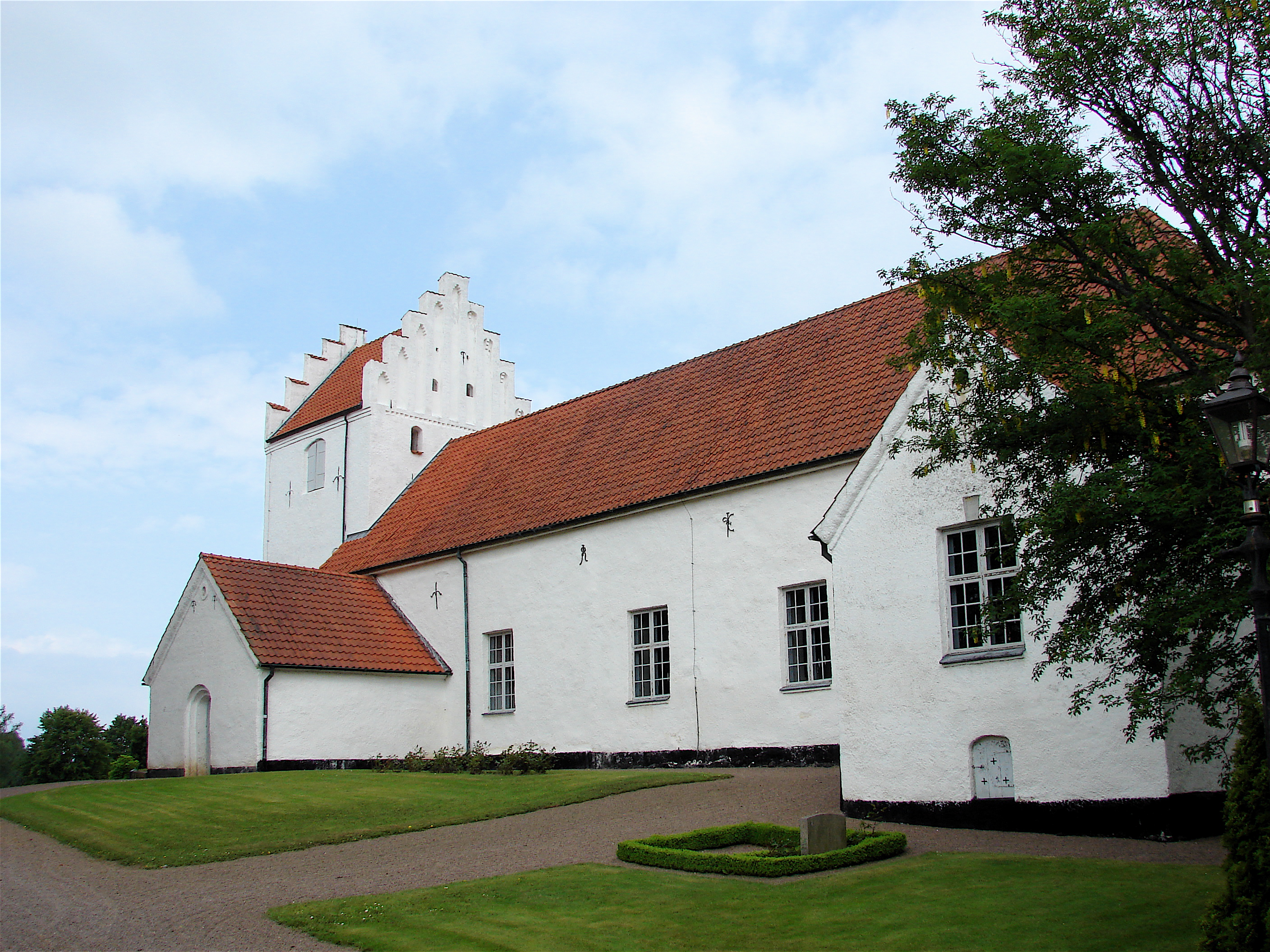 Kågerød kirke, Kågeröd kyrka, Brahe, Onsø herred, Onsjö härad, Kågerød church